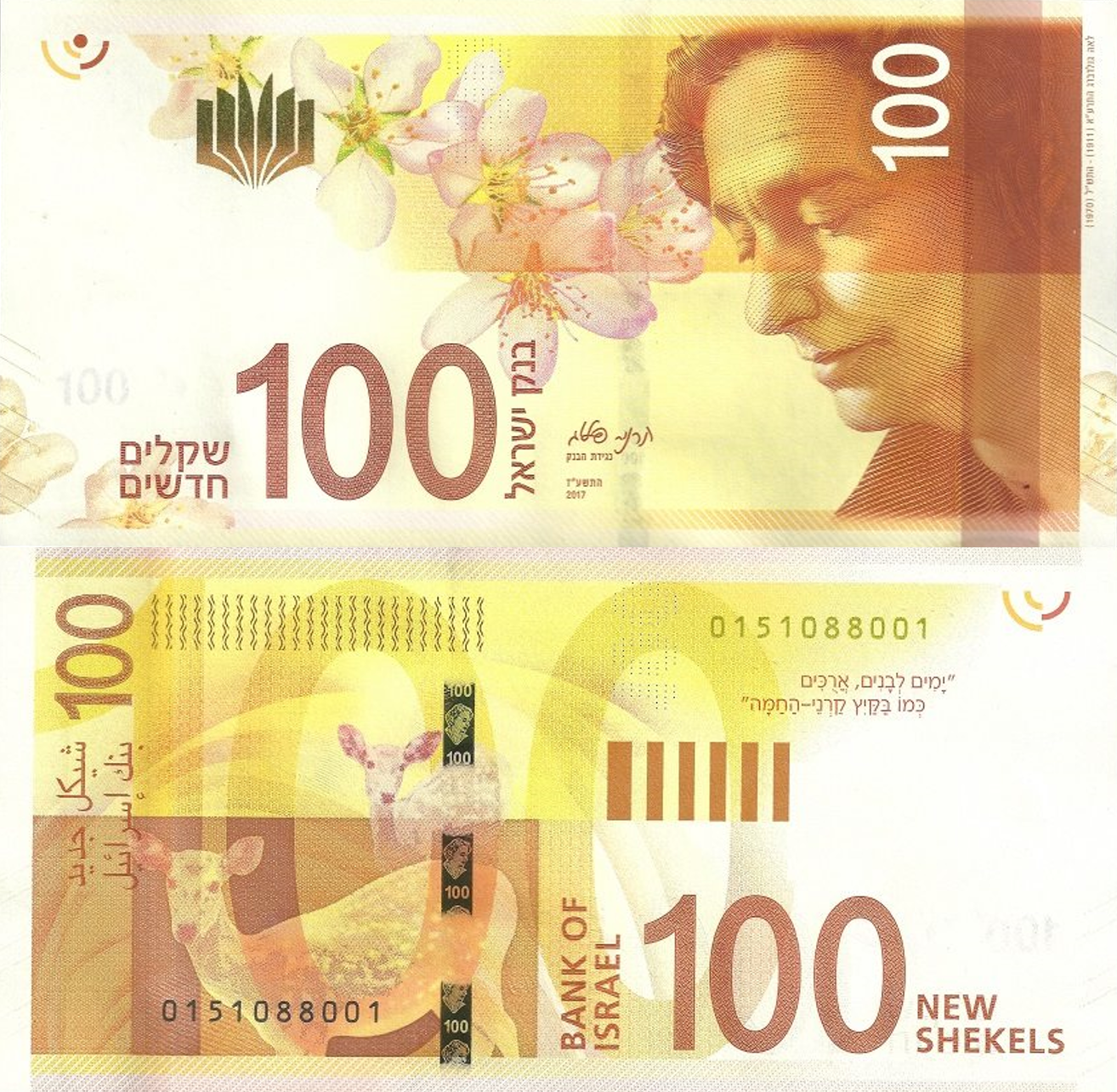 Banknote of 100 NIS from series C